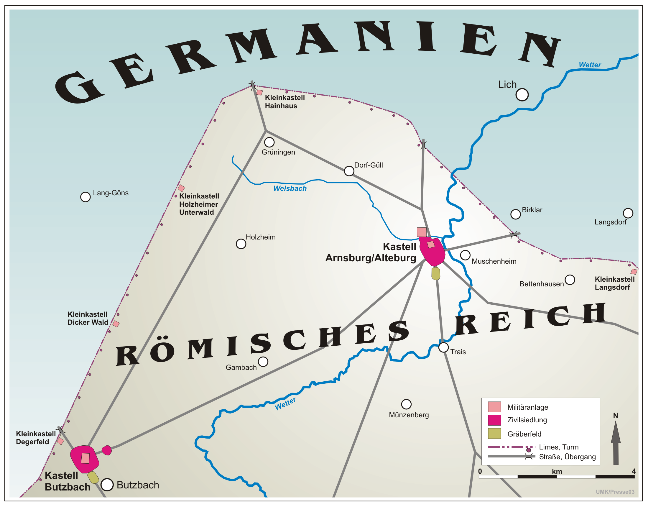 Verlauf des obergermanisch-raetischen Limes in der Wetterau, Hessen, Deutschland mit Lage der Kastelle Arnsburg und Butzbach